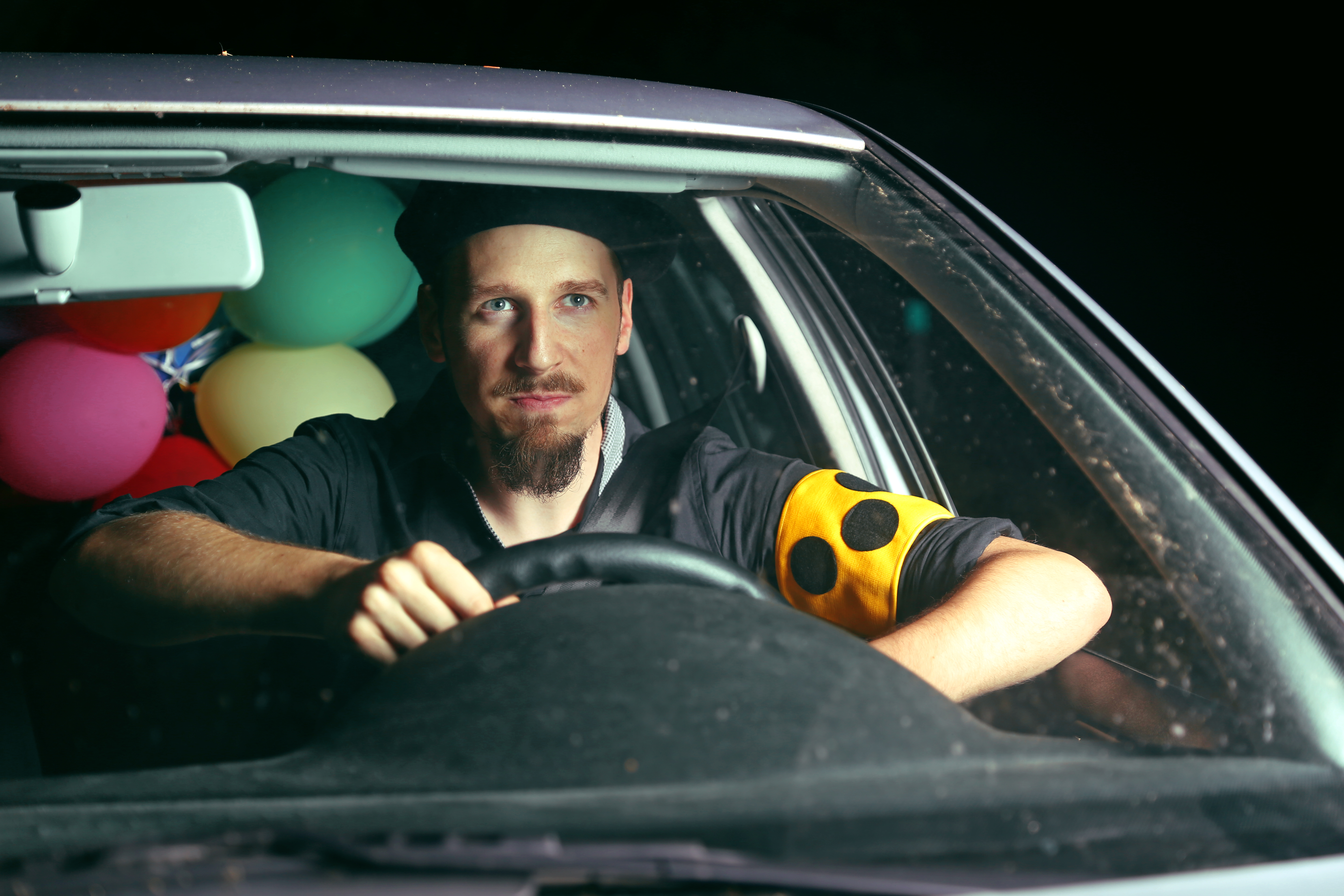 Pressefoto Alligatoahs (2015)